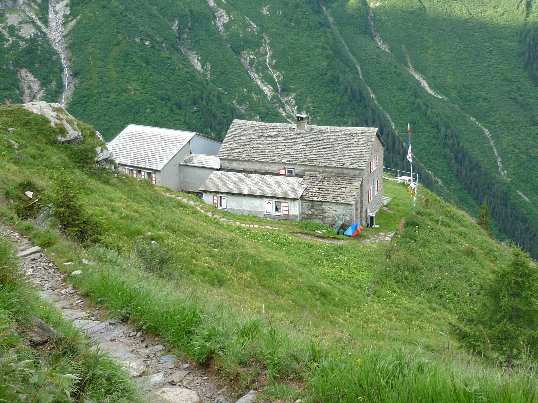 Adulahütte SAC, Carassinotal, Kanton Tessin, Schweiz